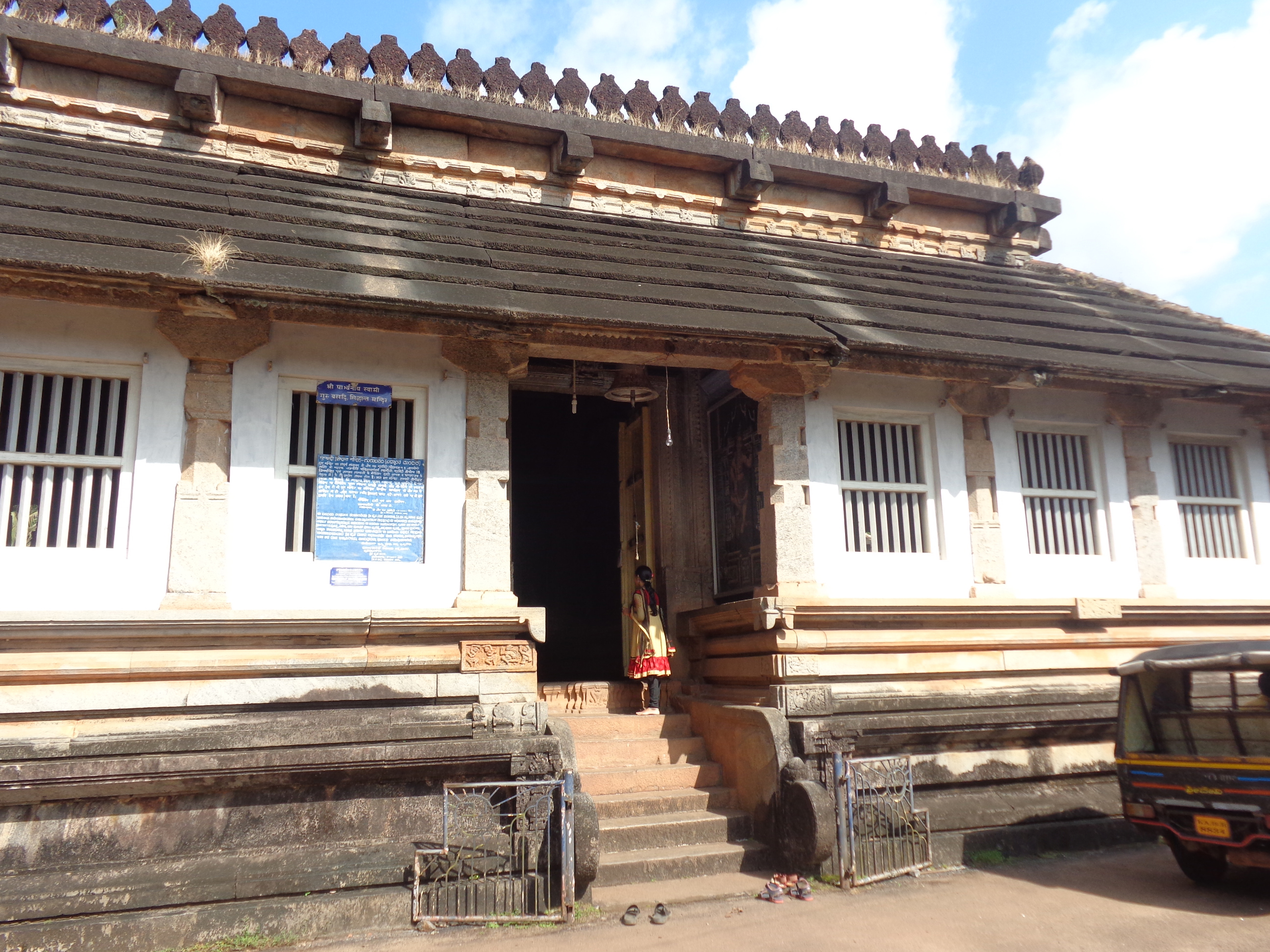 Gurubasati a view, Moodbidri, Karnataka, India